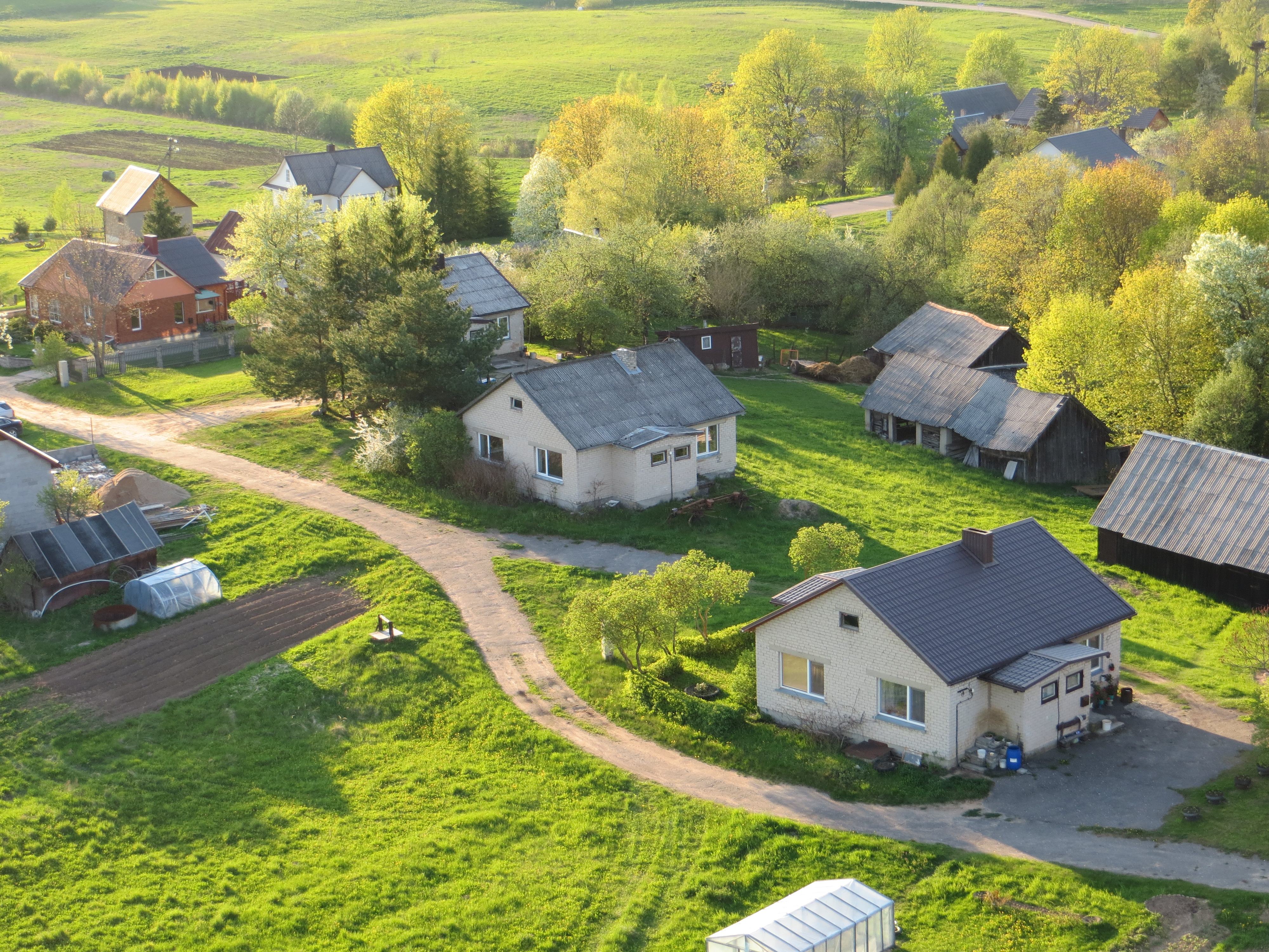 Velbiškės, Lithuania